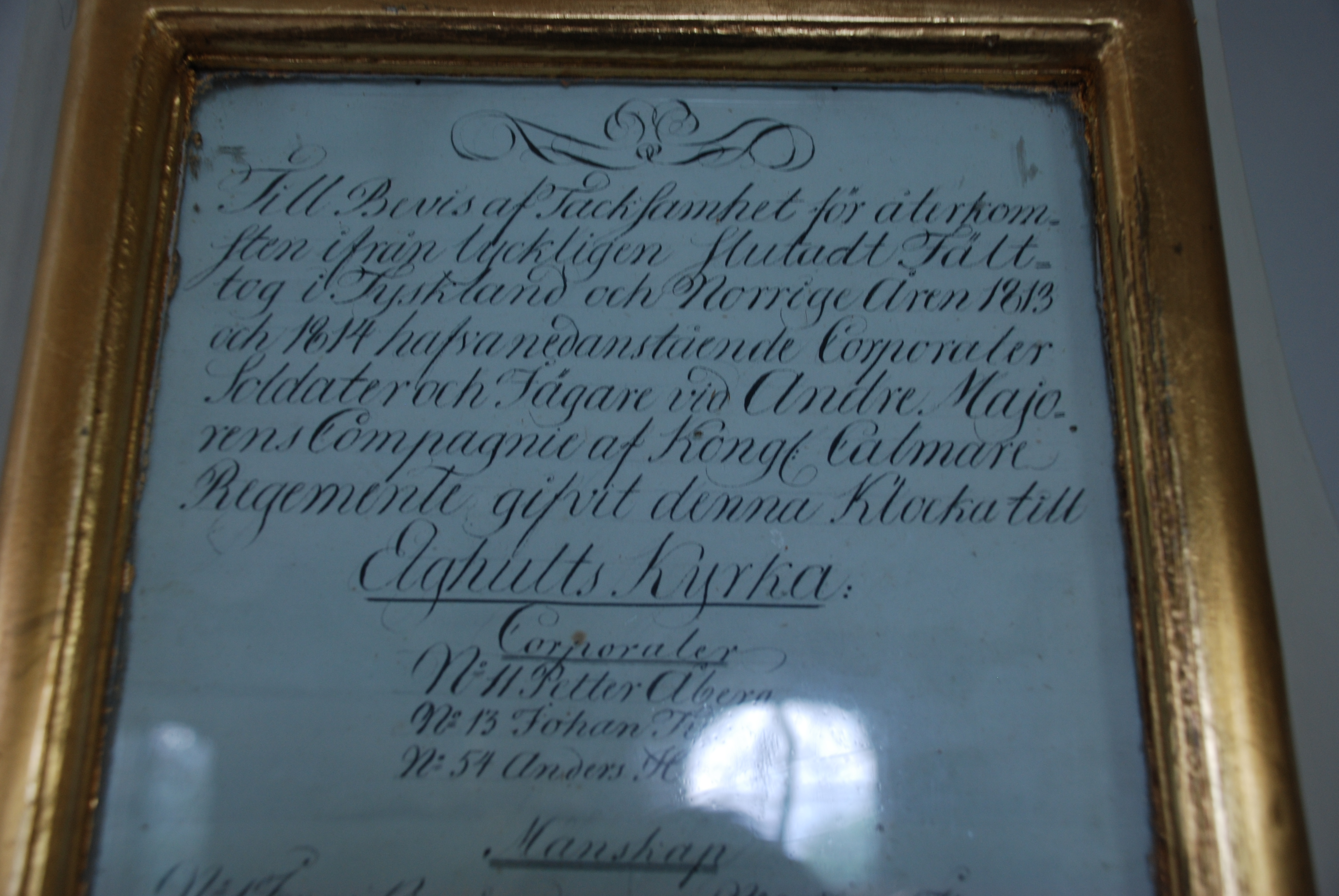 Till bevis av tacksamhet för återkomsten ifrån lyckligen slutadt fälttog i Tyskland och Norrige åren 1813 och 1814 hafva nedanstående corporaler, soldater och jägare vid Andre Majorens Compagnie av Kongl. Calmare regemente gifvit denna klocka till Elghults kyrka.